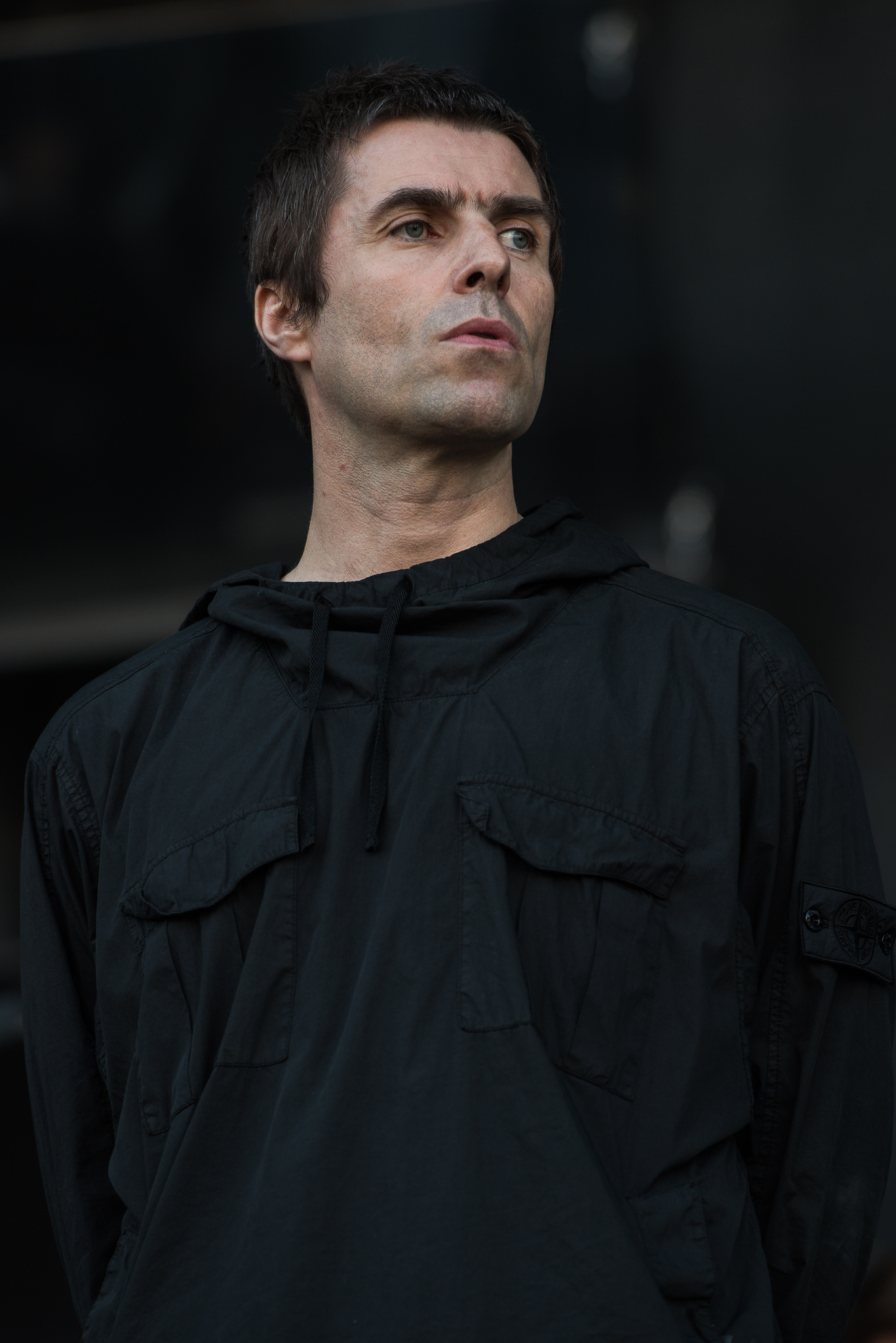 ARGO-Konzerte,Beck's Park Stage,Konzert,Liam Gallagher,Livekonzert,Livemusik,Musik,RiP,Rock im Park 2017